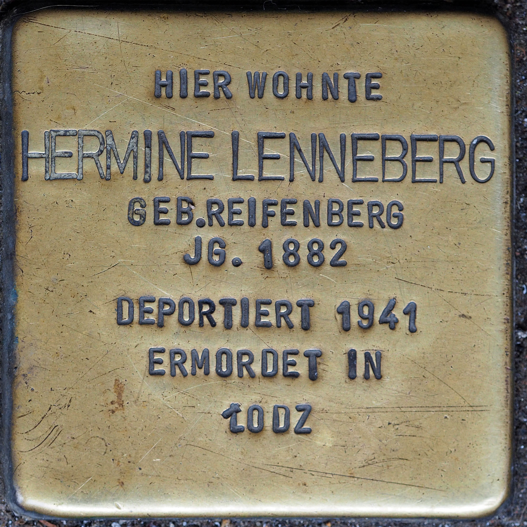 Stolpersteine MG: Lenneberg, Hermine